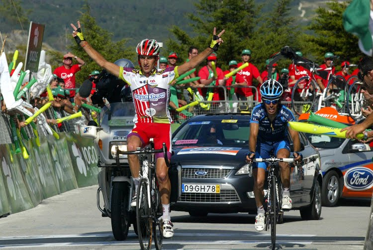 Nuno arrebata amarela na Sraº da Graça